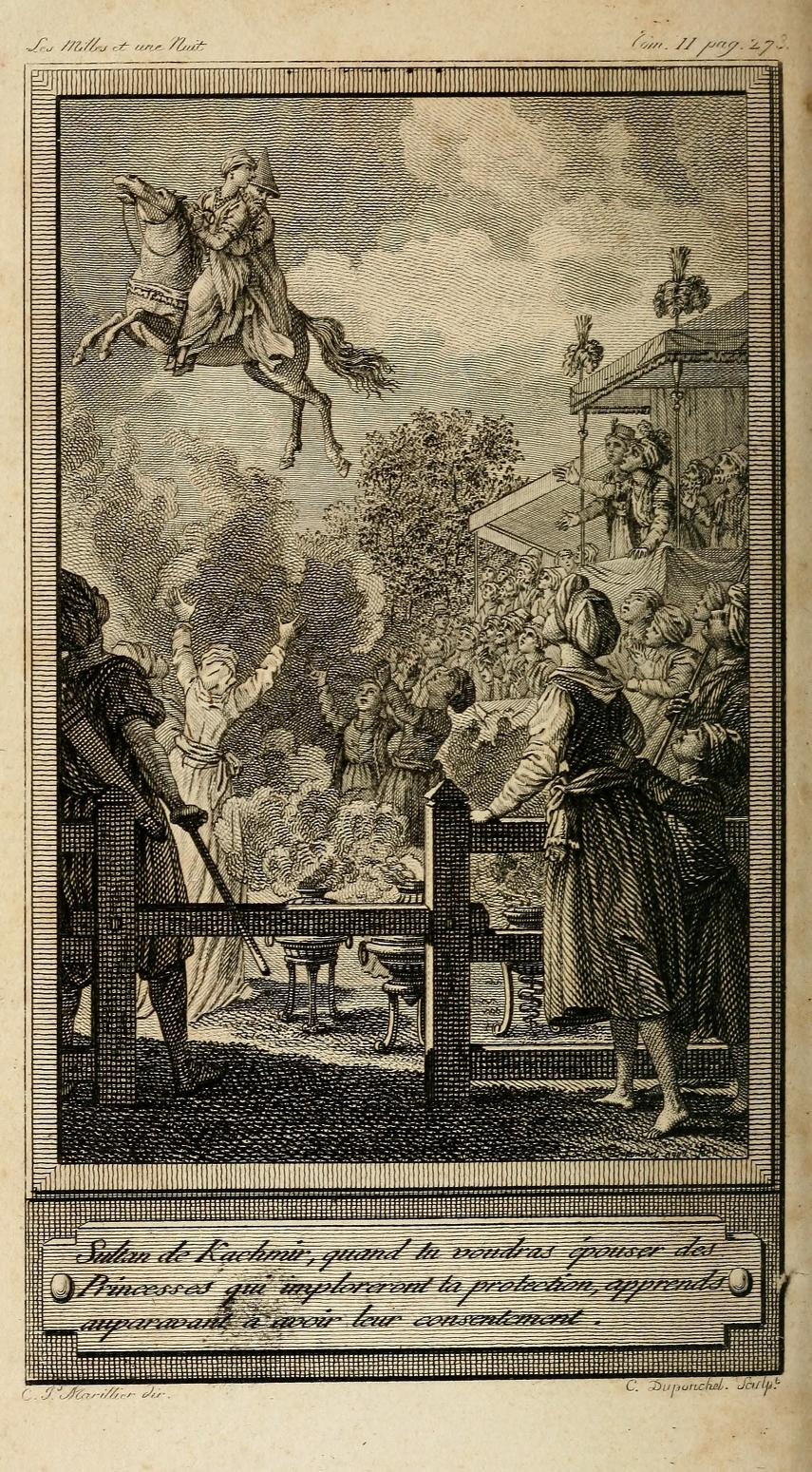 Arabian Nights Illustration